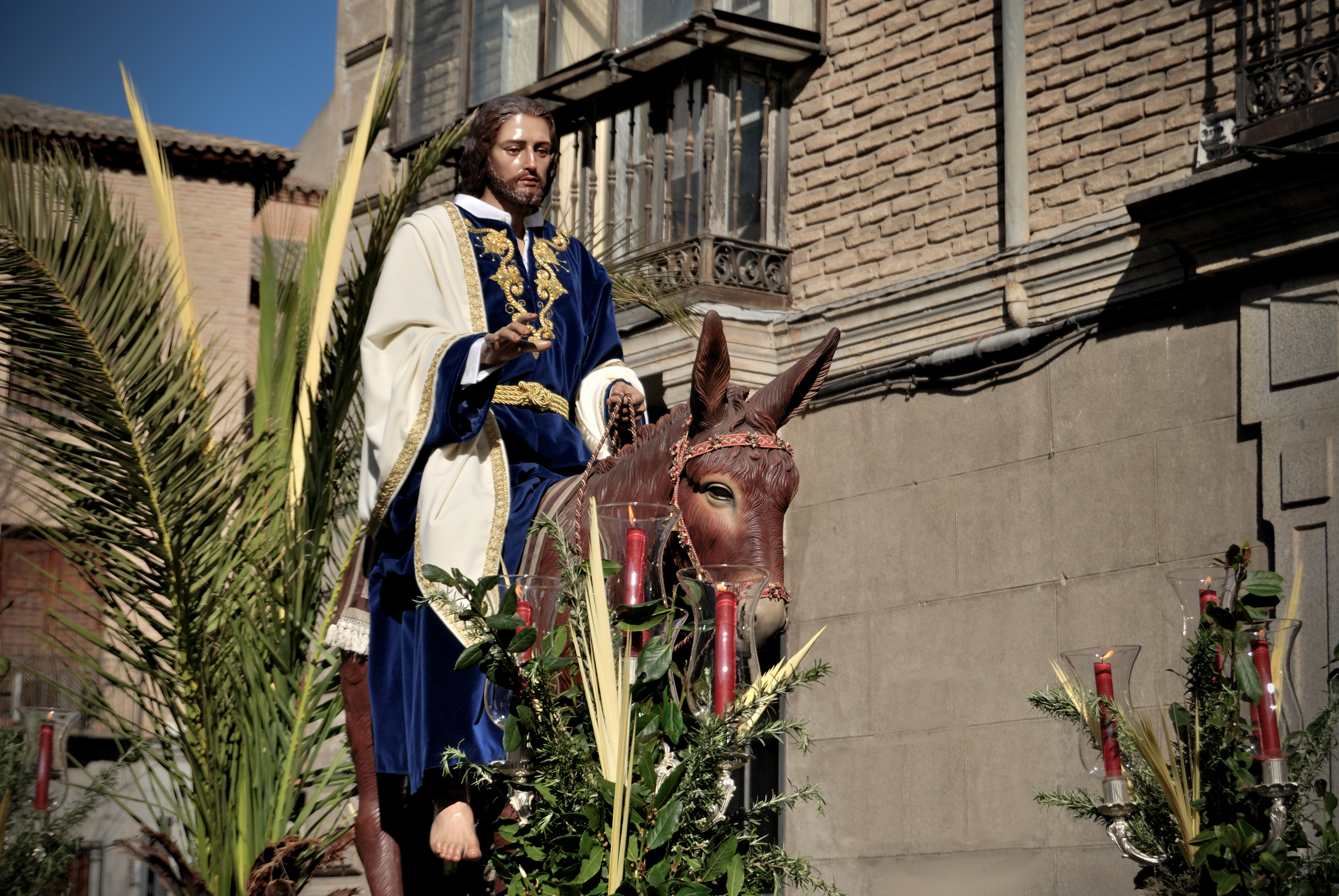 Entrada de Jesús en Jerusalén - Toledo, España.